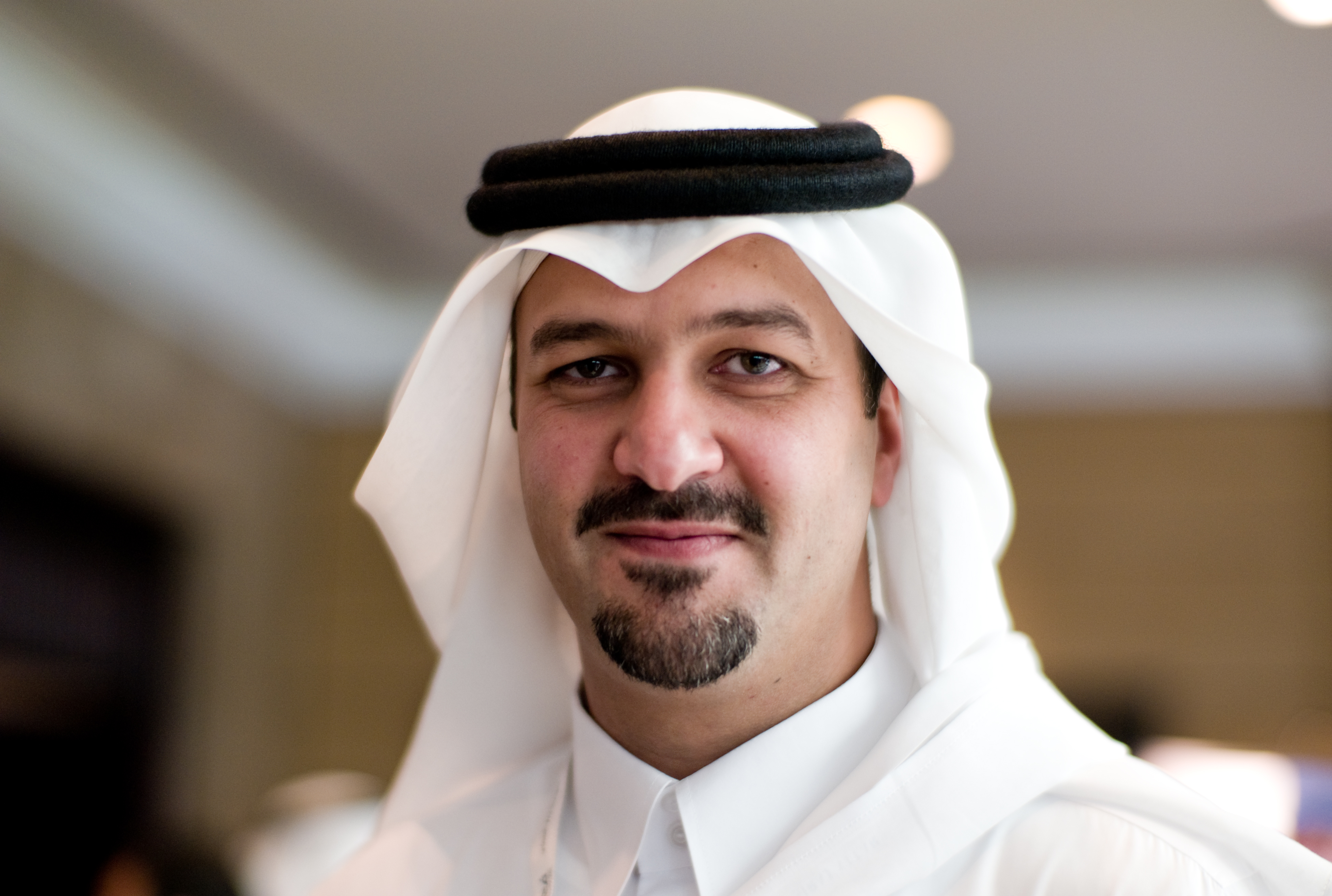 Prince Bandar Bin Khalid Al Faisal